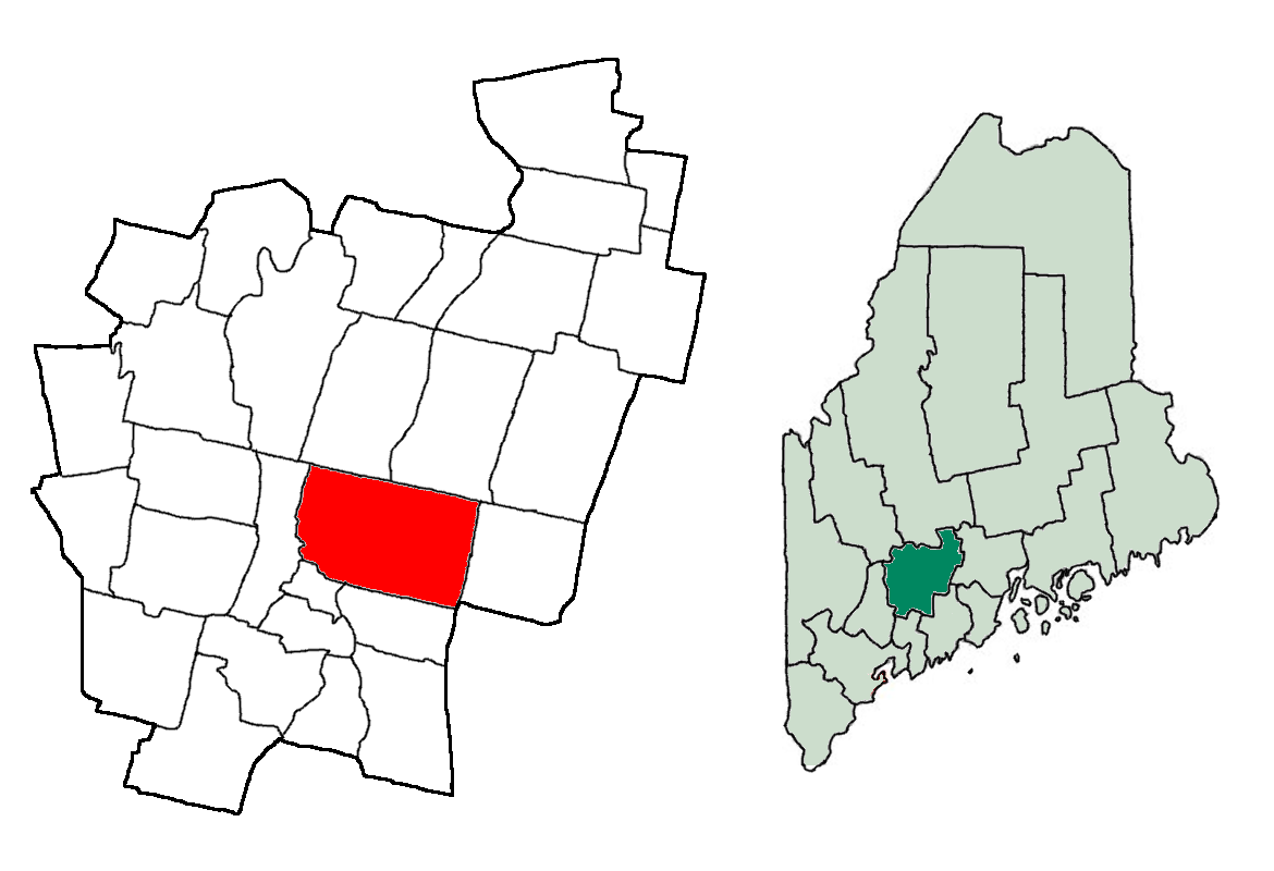 Made using US Census Bureau Data.